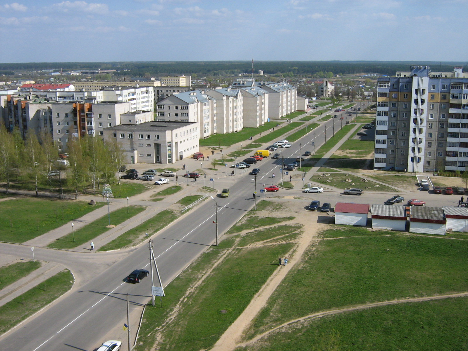 г. Столбцы, Беларусь, Центральная улица города